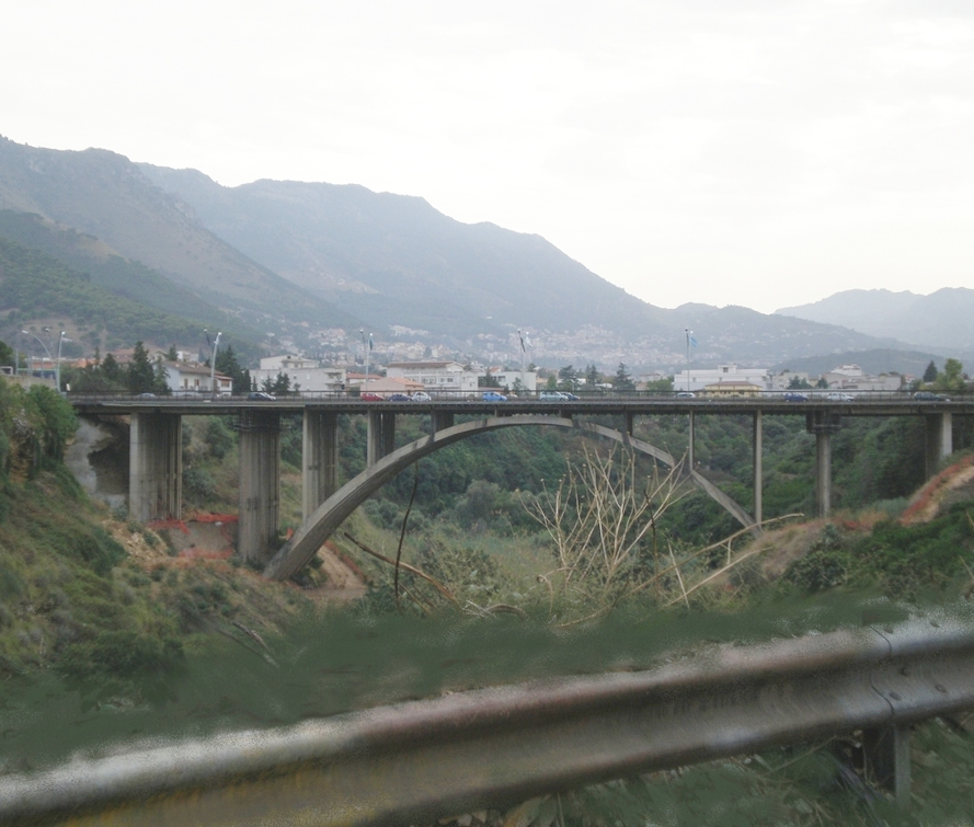 sono l'autore rilascio tutti i diritti